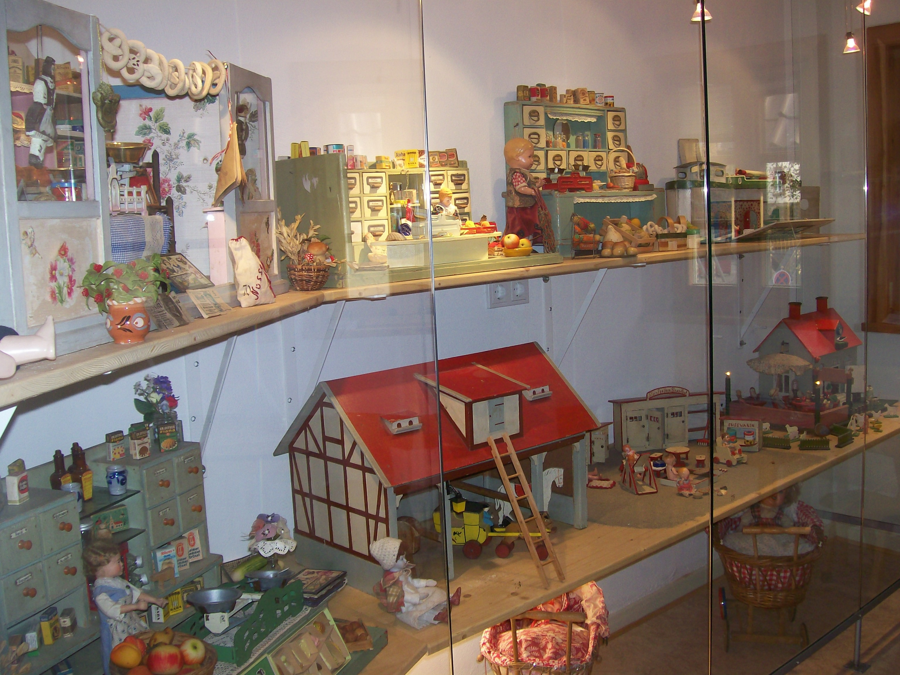 Alsfelder Märchenhaus mit Puppenstuben-Etage.